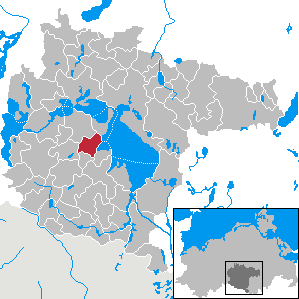 Sietow im Landkreis Müritz, Mecklenburg-Vorpommern